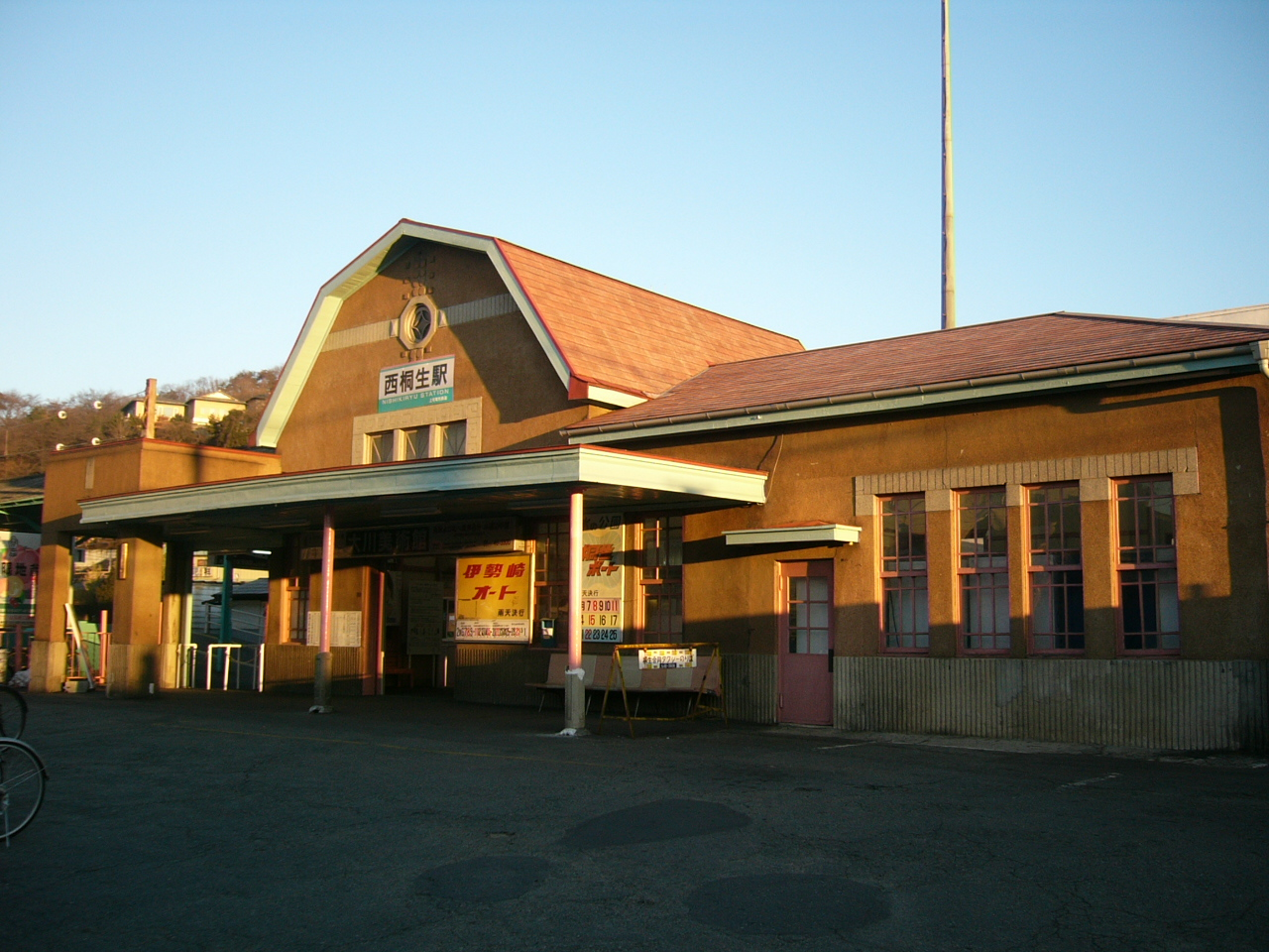 Nishikiryu Station